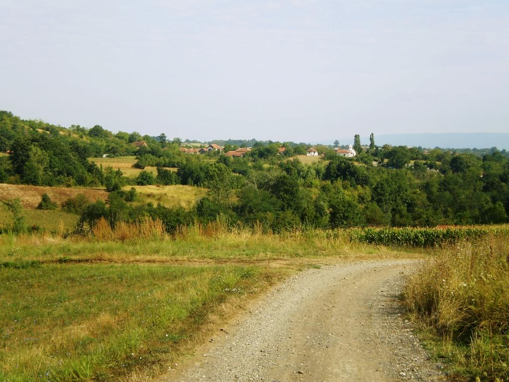 Doljane (Kruševac)